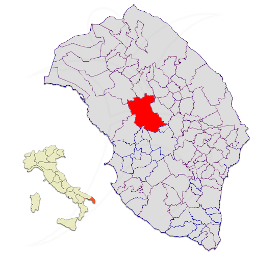 Il territorio di Galatina nella provincia di Lecce